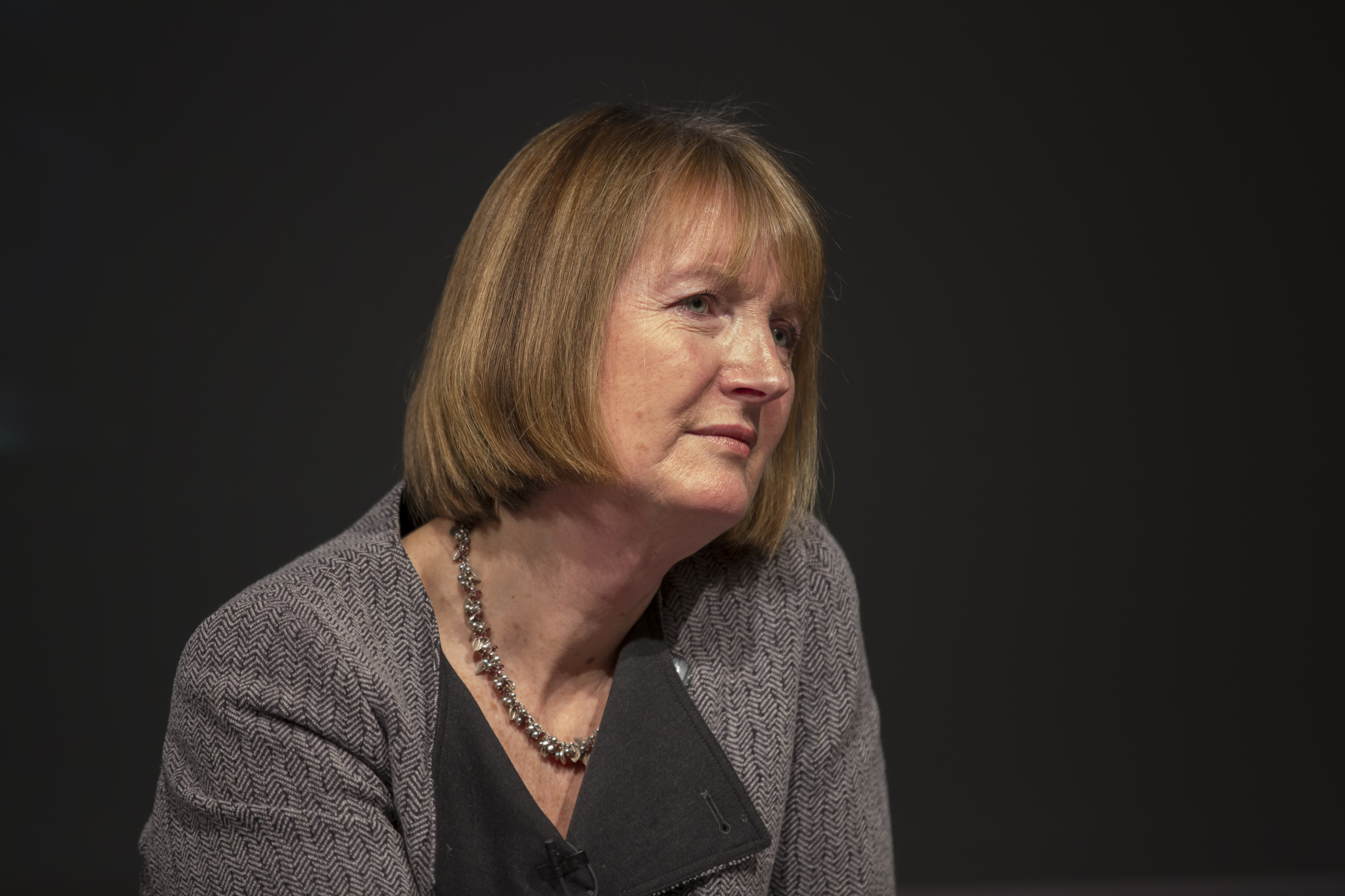 Harriet Harman